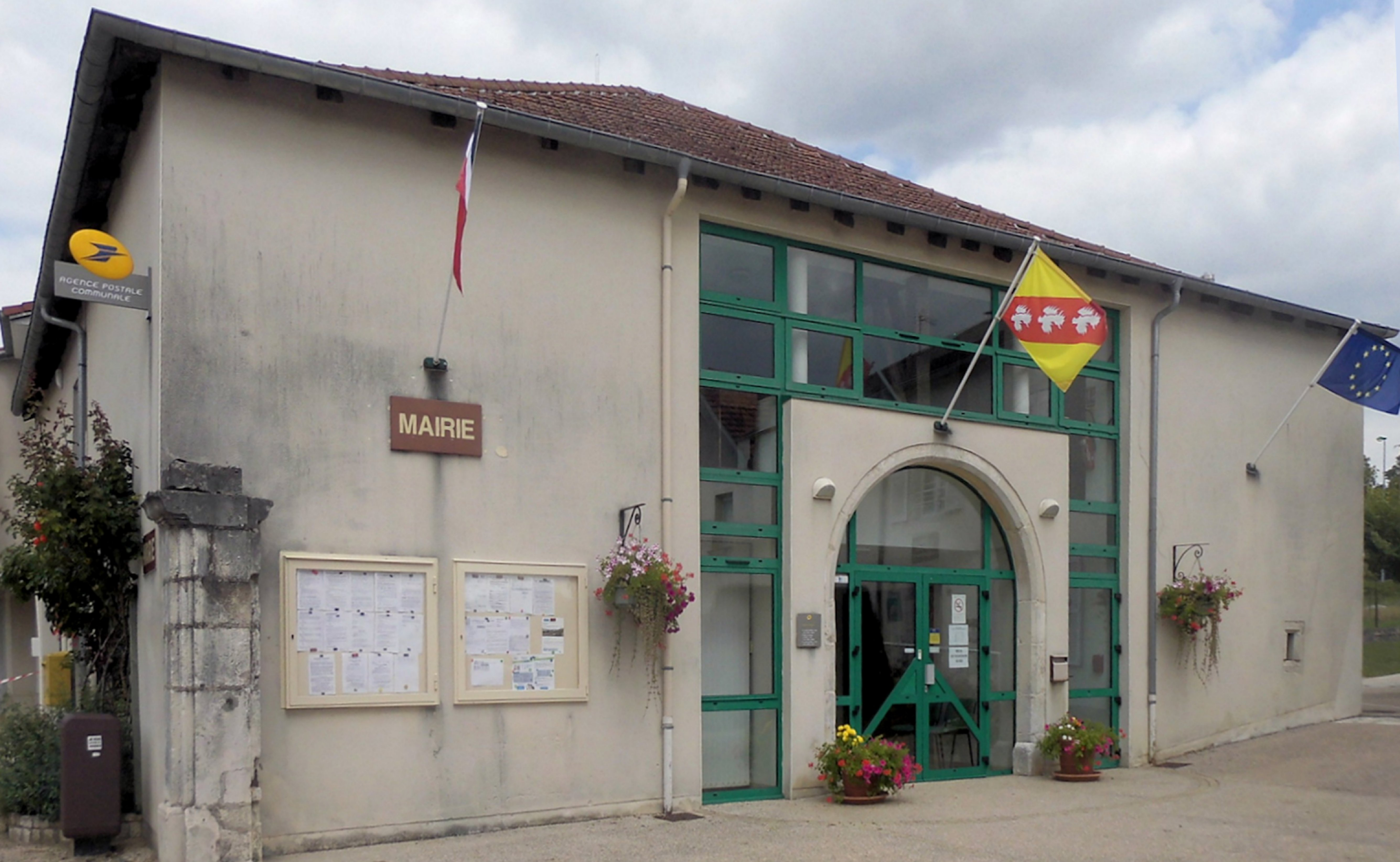 La mairie d'Attignéville, Rue Saint-Lambert